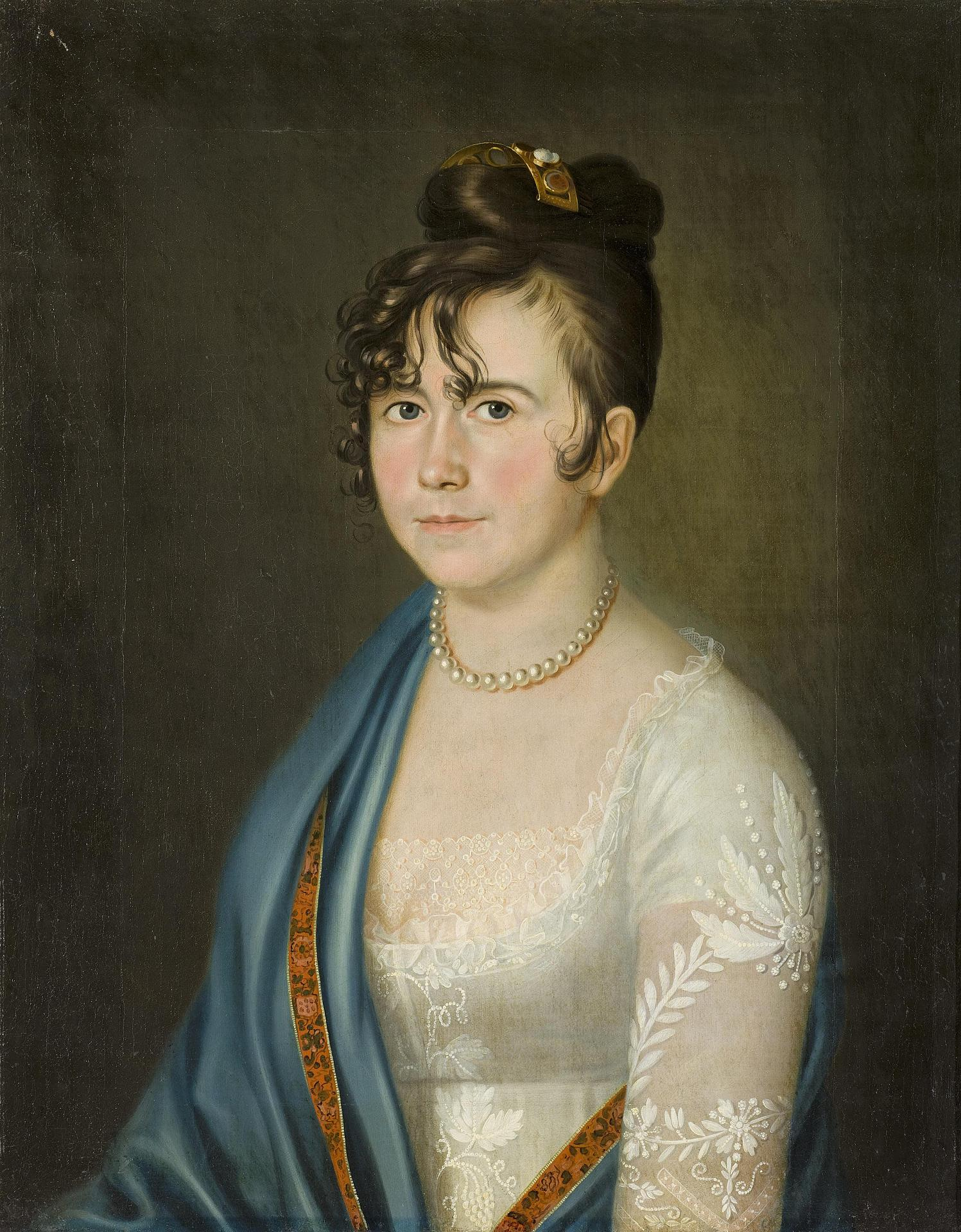 Анна Владимировна Бобринская (1769–1846), супруга А.Г. Бобринского, урожденная баронесса Унгерн-Штернберг